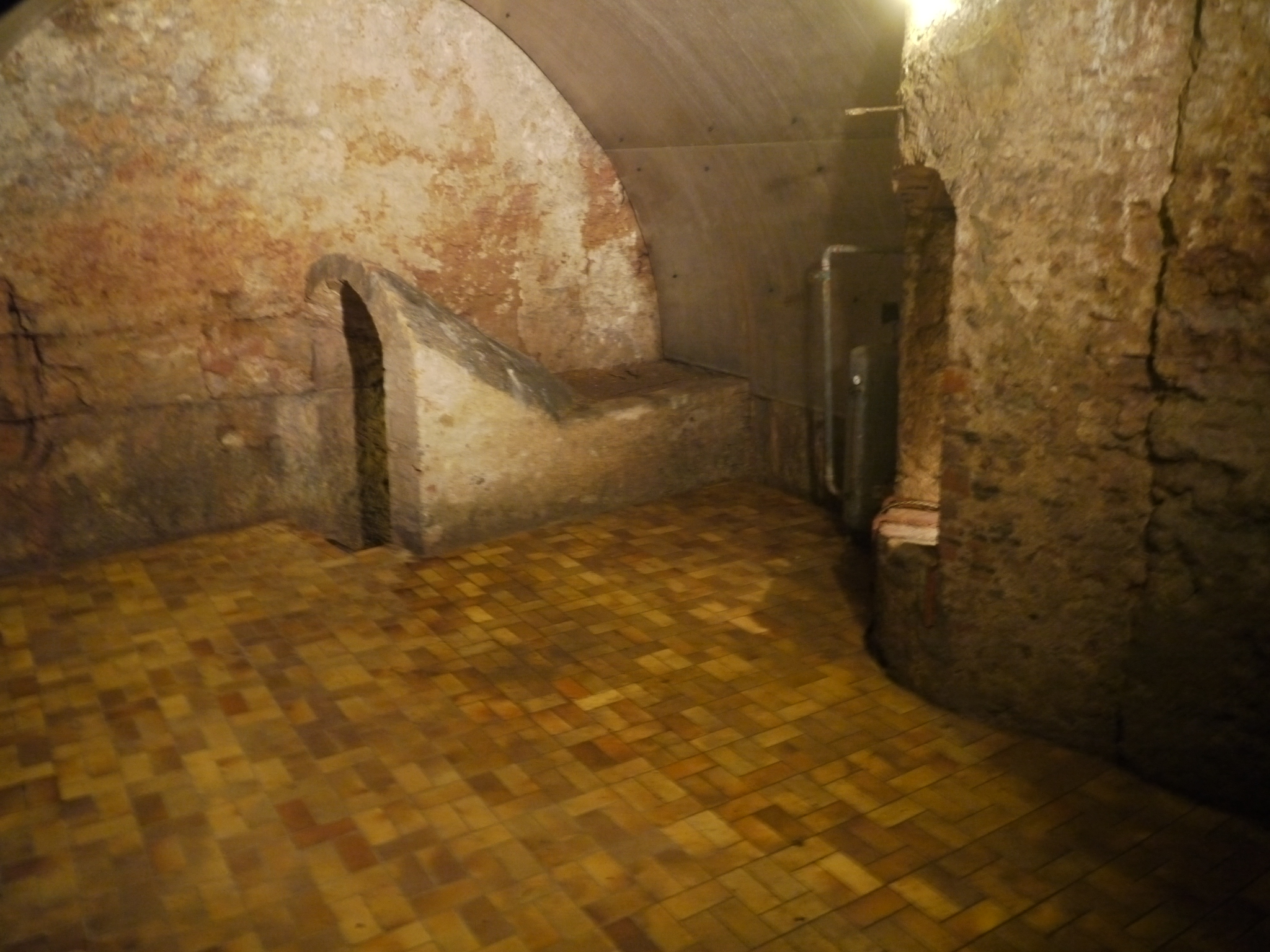 Brunnenkeller des Forsthaus Koberstadt